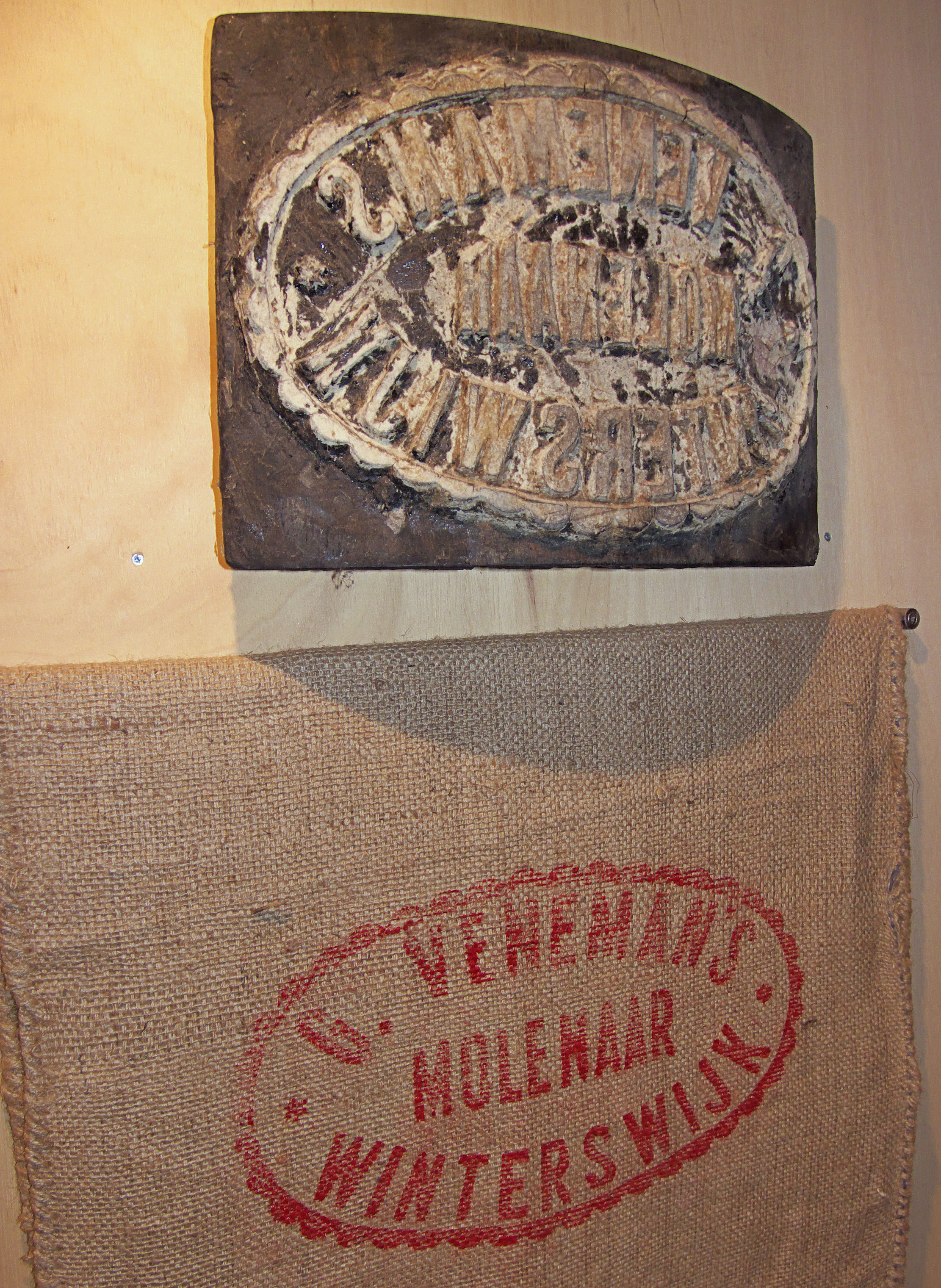 Venemansmolen, zakkenstempel